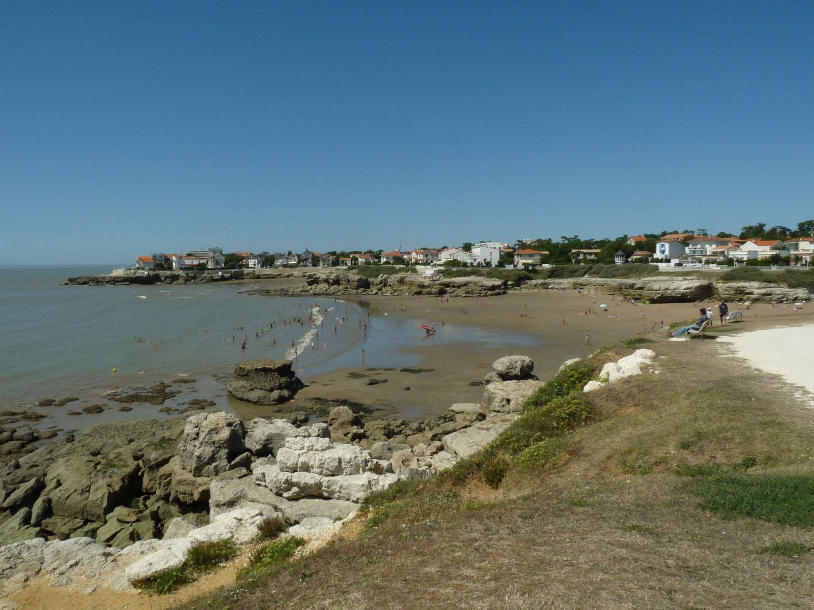 plages du Chay et du Pigeonnier vues depuis la pointe du Chay à Royan (17), France